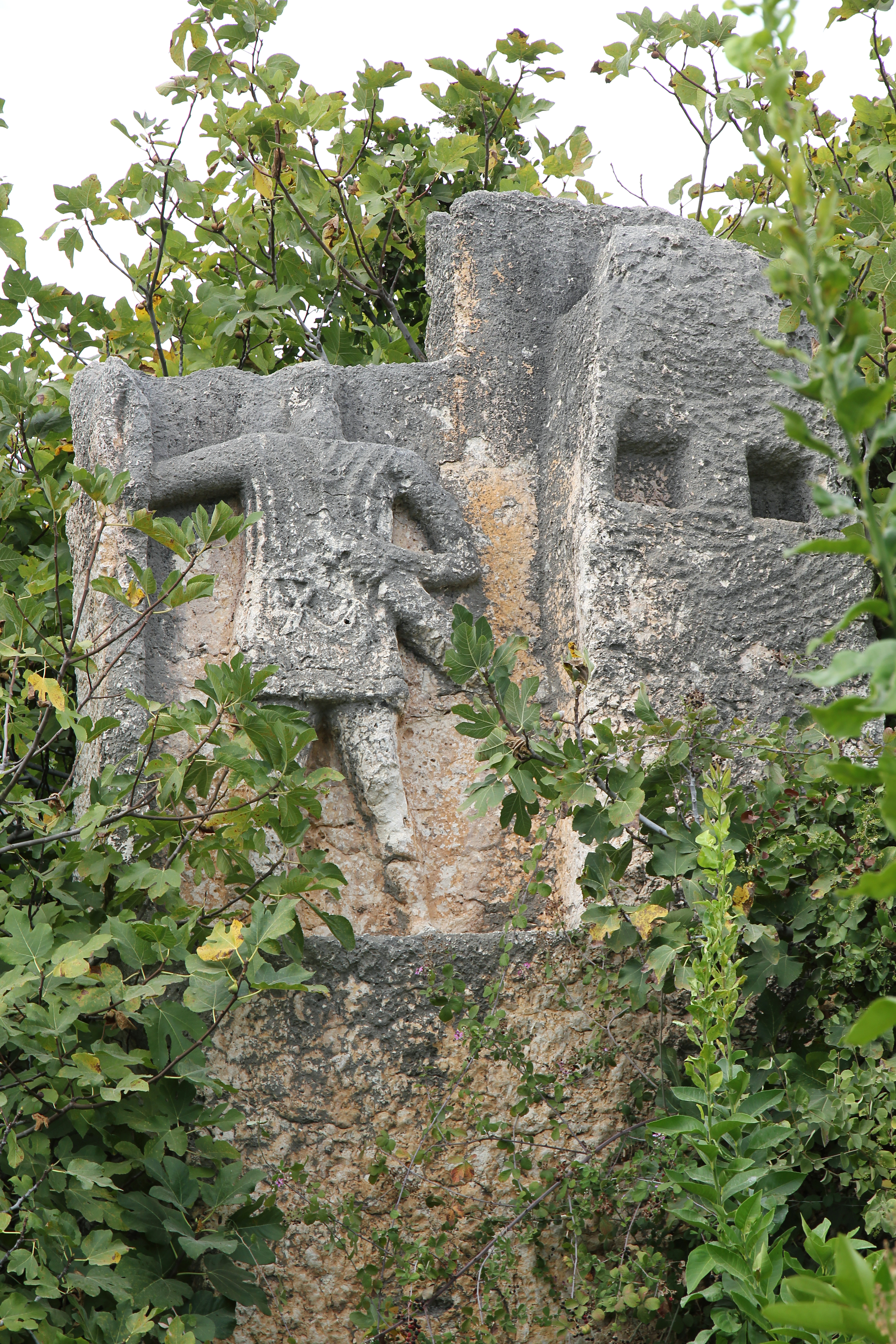 Korykos, archäologischer Fundort in der Südtürkei, Kriegerrelief in Nekropole I